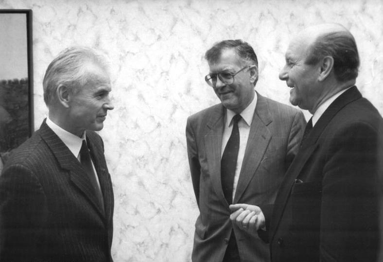 ADN-ZB Settnik-18.12.89-fd Berlin: Wagner-Besuch-DDR-Regierungschef Dr. Hans Modrow (l) empfing den Ministerpräsidenten von Rheinland-Pfalz, Carl-Ludwig Wagner (r). An der Begegnung nahm auch der Leiter der Ständigen Vertretung der BRD in der DDR, Dr. Franz Bertele (Mitte) teil.